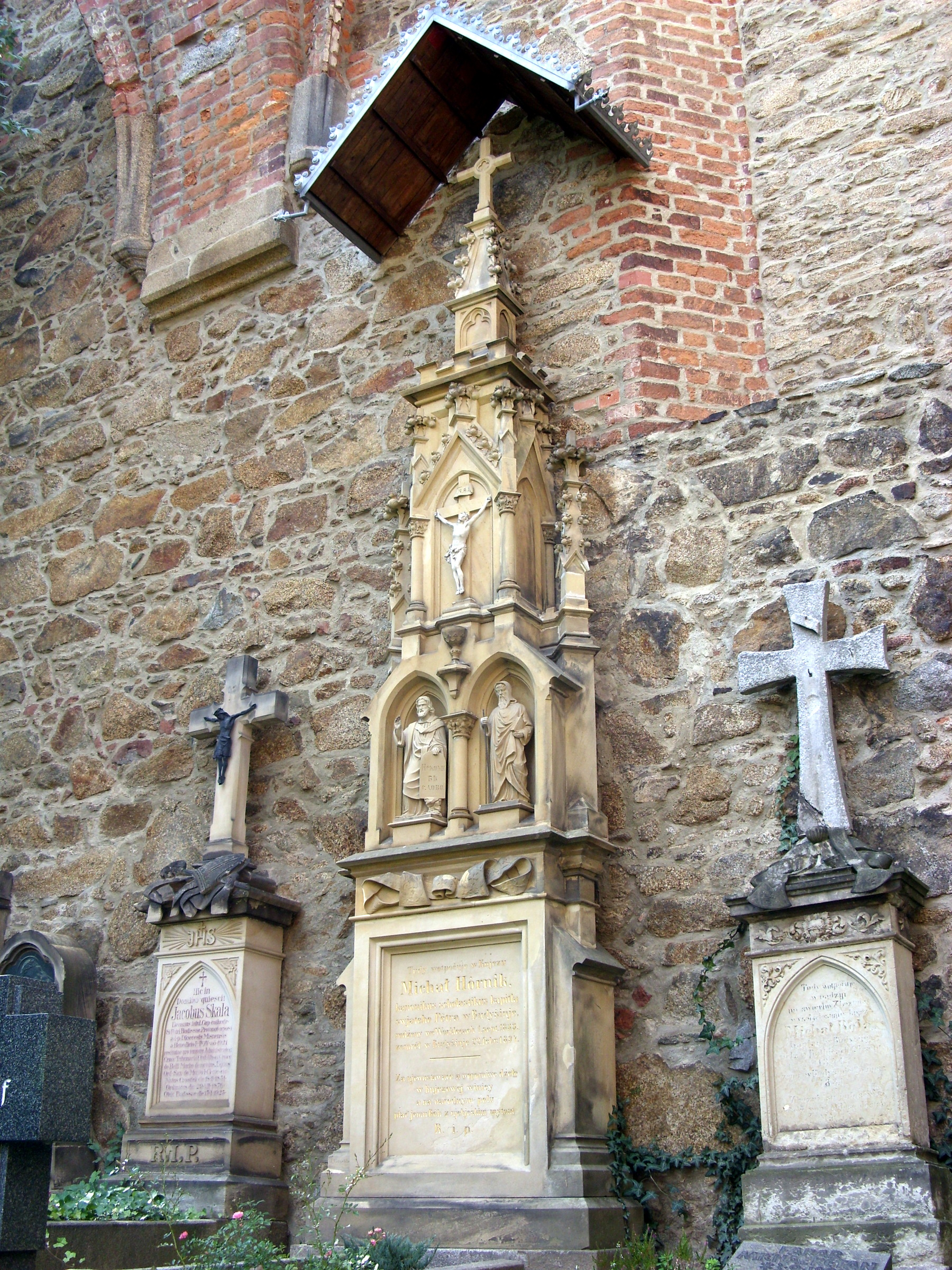 Hornjoserbsce: Row Michała Hórnika na Budyskim Mikławšku.